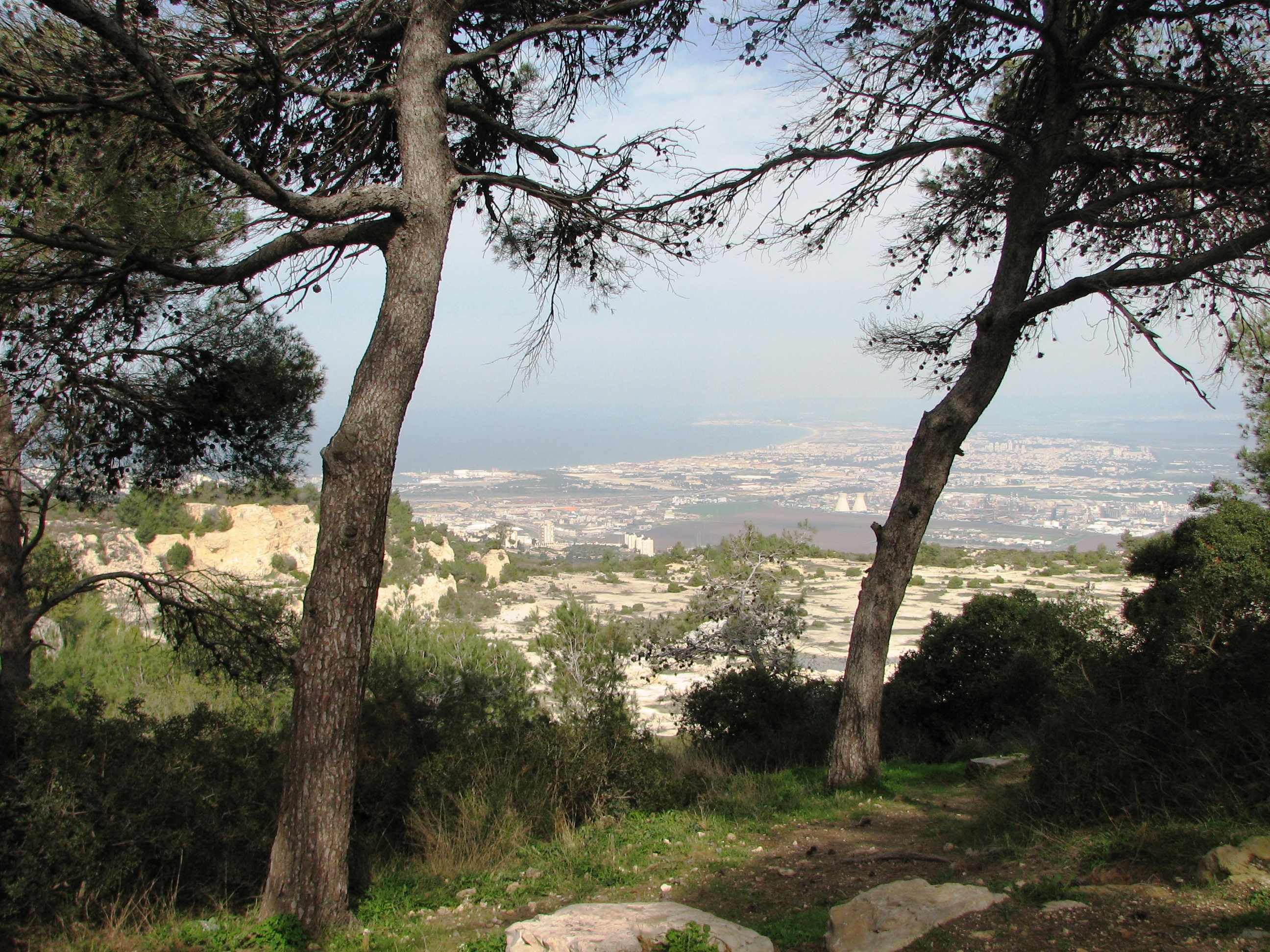 Givat Hahagana is a memorial Cenotaph to Haganah . it was was a Jewish paramilitary organization in what was then the British Mandate of Palestine from 1920 to 1948, which later became the core of the Israel Defense Forces. גבעת ההגנה על הר הכרמל ליד אוניברסיטת חיפה. נקראת על שם ארגון ההגנה. אנדרטה לזכרון. סביב האנדרטה מתקנים לנופש ושולחנות נוף הנשקף מגבעת ההגנה לכוון מערב. מחצבת "חרייבה" הנטושה של בית חרושת למלט נשר